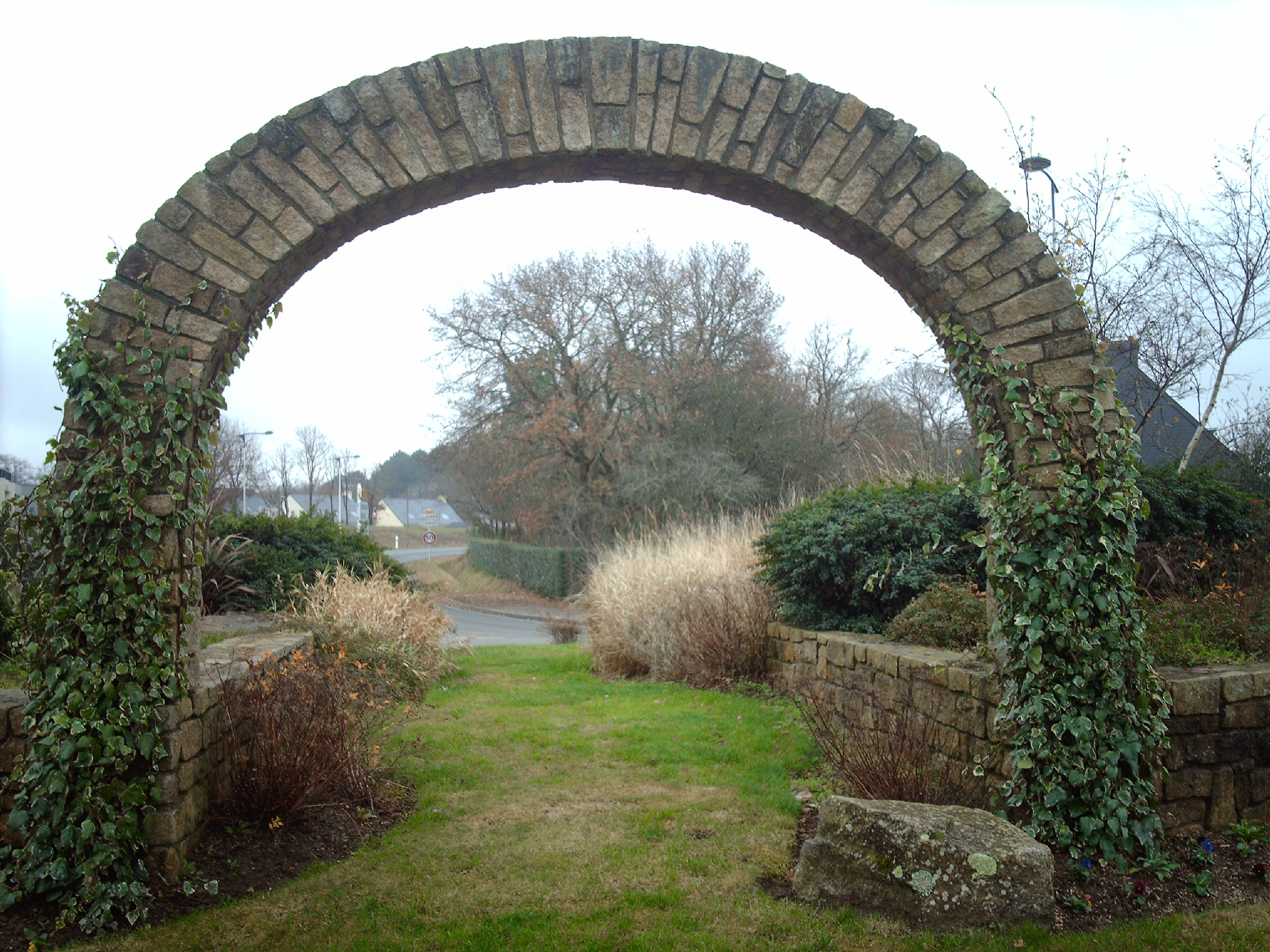 Arche en pierre à l'entrée de ploeren(56)